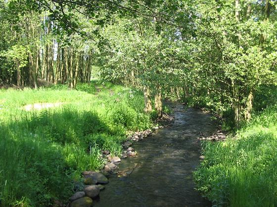 Kloster/Stift Marienfließ, Prignitz, Brandenburg. Stepenitz am Klosterpark.